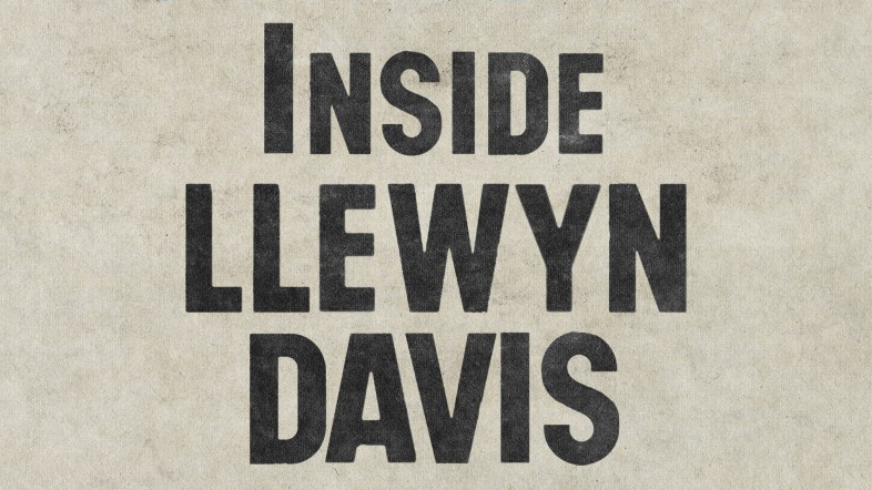 Logotipo de la película Inside Llewyn Davis (2013), producida por Mike Zoss Productions, Scott Rudin Productions y StudioCanal, dirigida por los hermanos Coen. Poster y logotipo diseñados por BLT Communications, LLC.